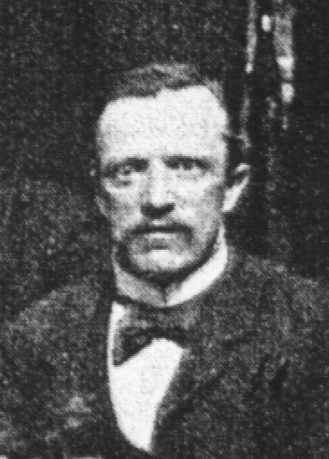 Paul Telge auf der Exkursion der Berliner Gesellschaft für Anthropologie, Ethnologie und Urgeschichte nach Weisdin bei Neustrelitz am 28. Juni 1885